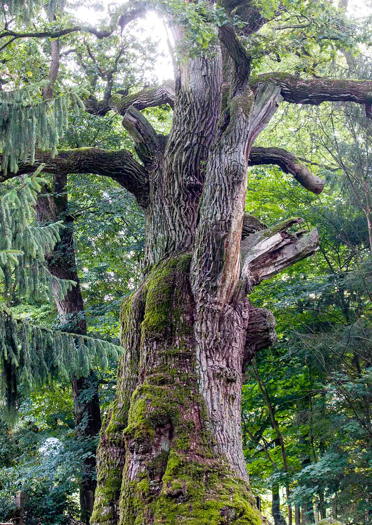 Kroneiche bei Röbel/Müritz